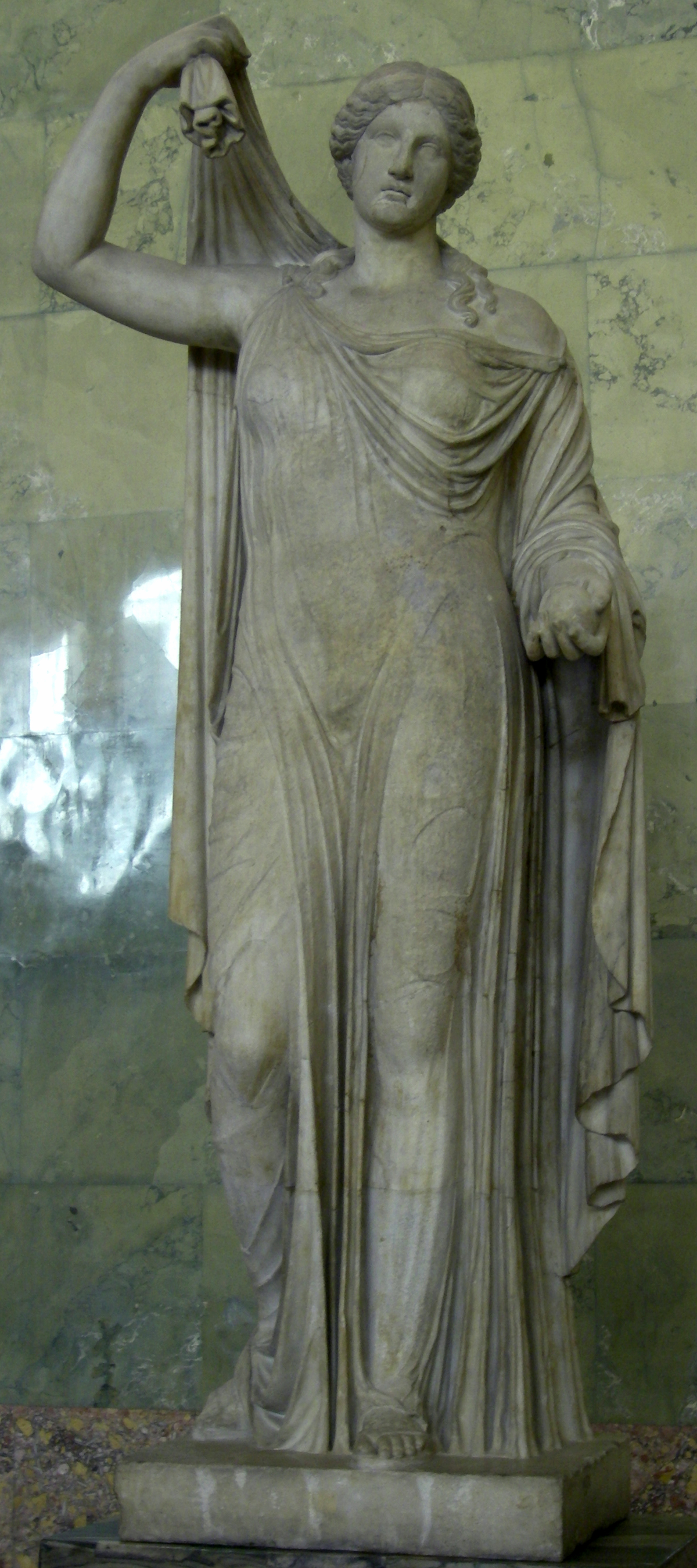 Венера (Богиня любви). Римская копия по греческой статуе Афродиты Каллимаха или школы Поликлета конца V в. до н.э. Мрамор, А 371. Эрмитаж, зал Юпитера. Санкт-Петербург, Россия.